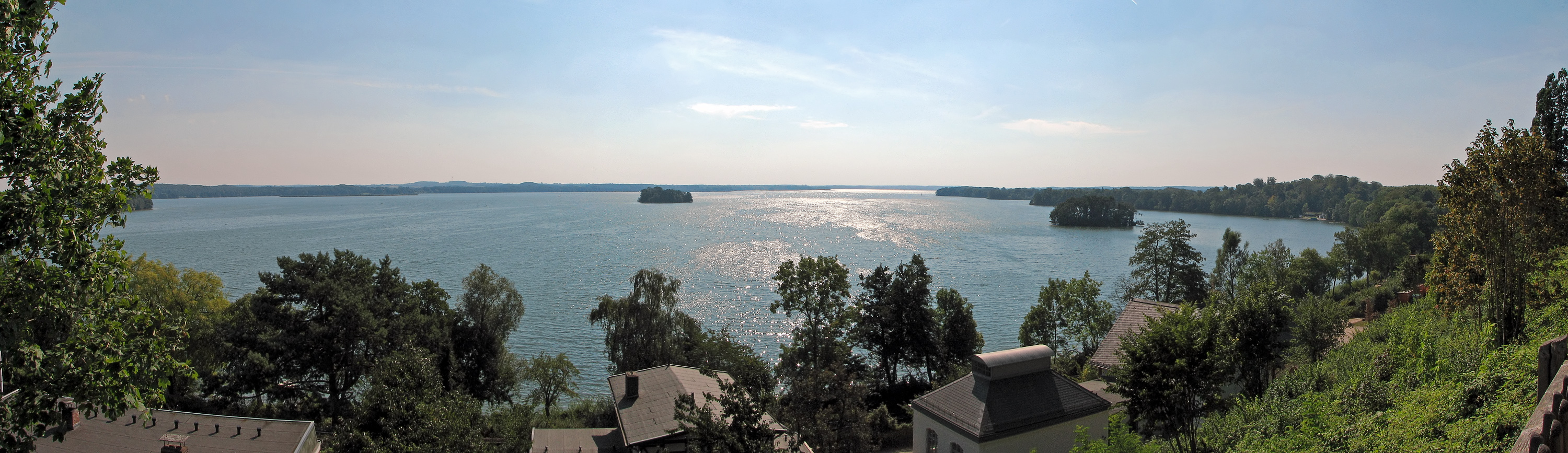 Beschreibung: Panorama des großen Plöner Sees vom Schlossberg aus aufgenommen linke kleine Insel (vom Baum teilweise verdeckt) nennt sich Olsborg Hankenborg in der Bildmitte unbebuschte große Insel weiter hinten zwischen beiden ist der Ruhlebener Warder rechts am Bildrand sieht man den Ausläufer der Prinzeninsel Insel rechts im Vordergrund vor der Prinzeninsel heißt Sterin Fotograf: Darkone, 5. September 2005